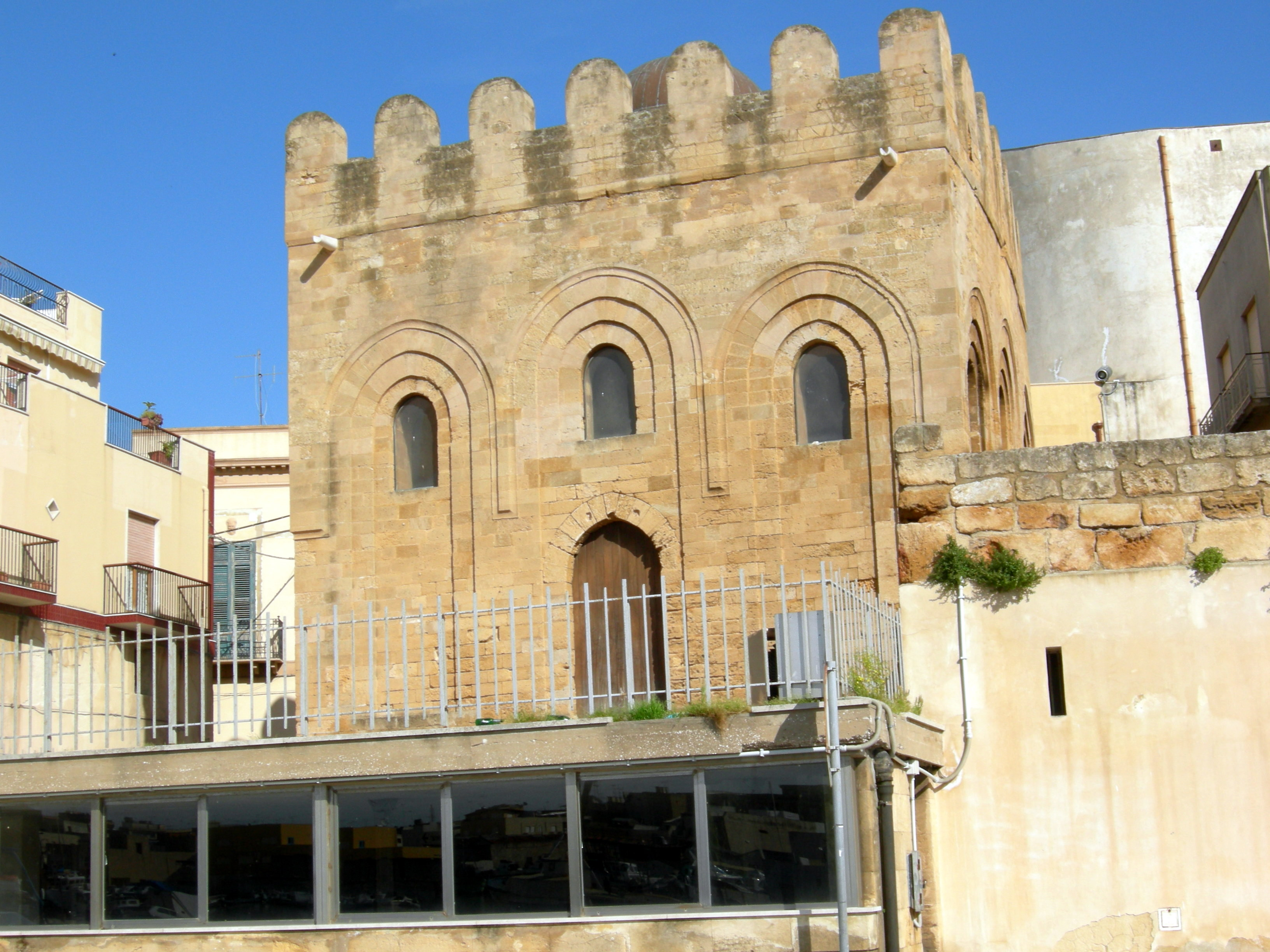 San Nicolò Regale Church, Mazara del Vallo, Sicily, Italy